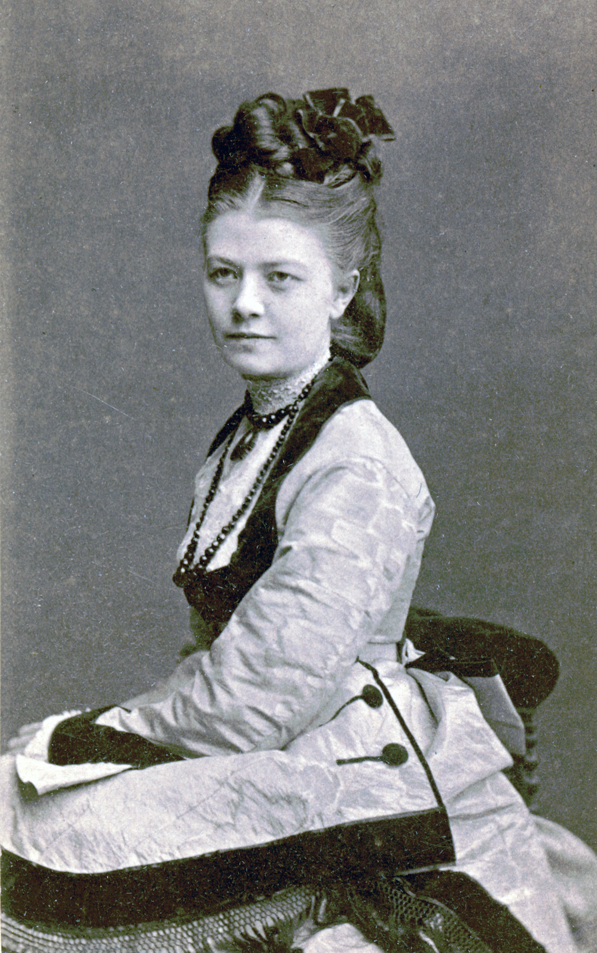 Amanda Nerman, skådespelare vid Kungliga Dramatiska teatern 1867